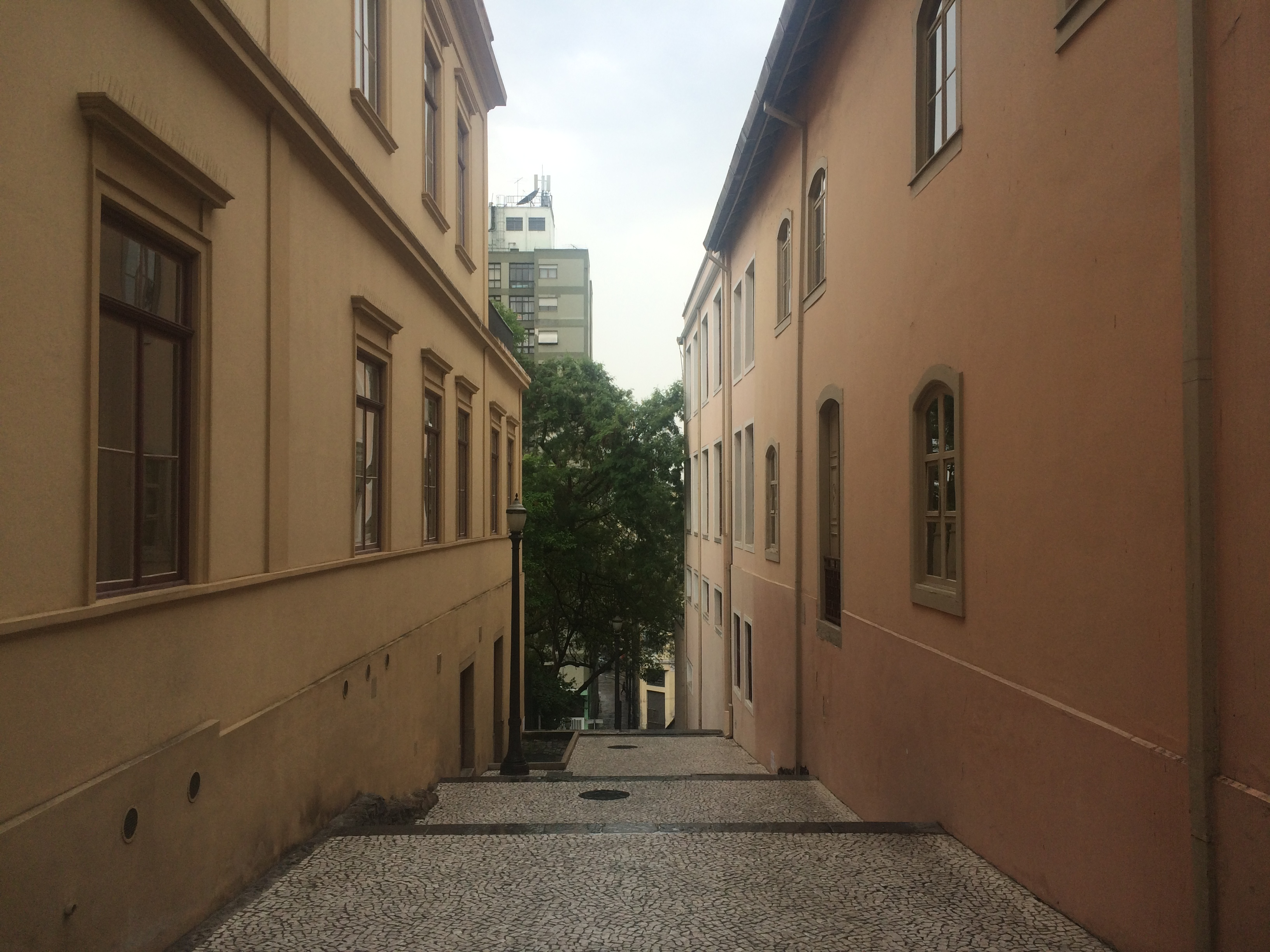 Imagem frontal da entrada do Beco do Pinto, com a Casa nº1 à esquerda e o Solar da Marquesa de Santos à direita